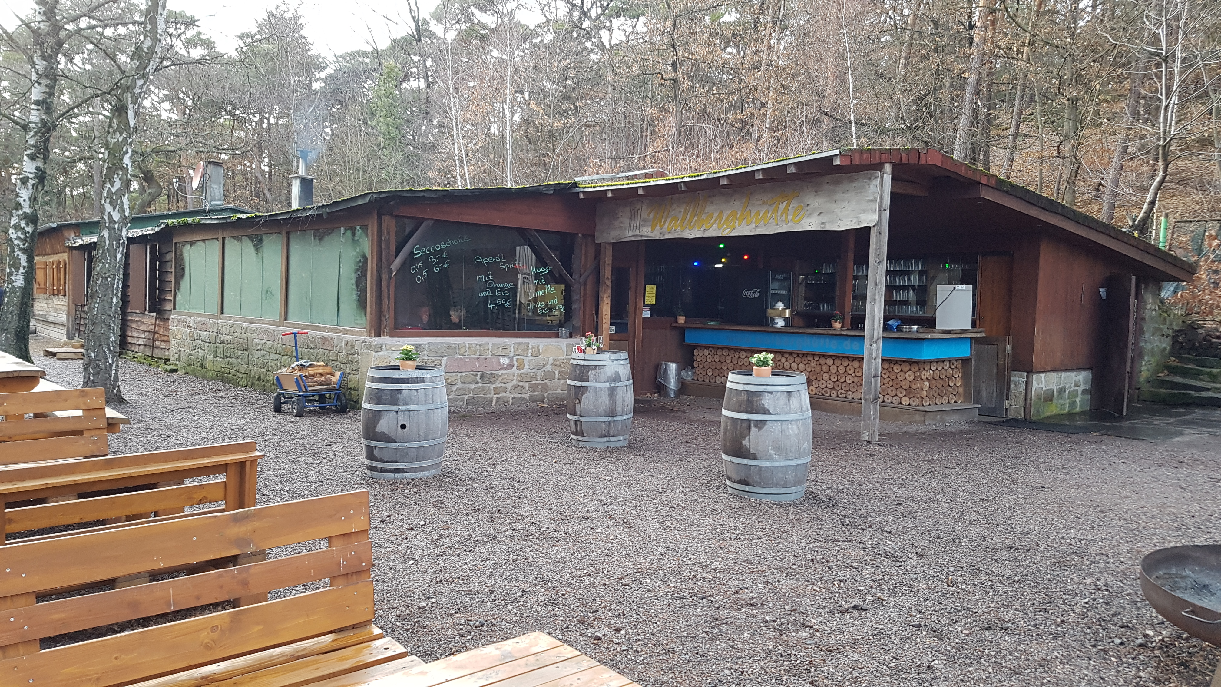 Waldgaststätte "Wallberghütte" am Turnerehrenmal / Deidesheim